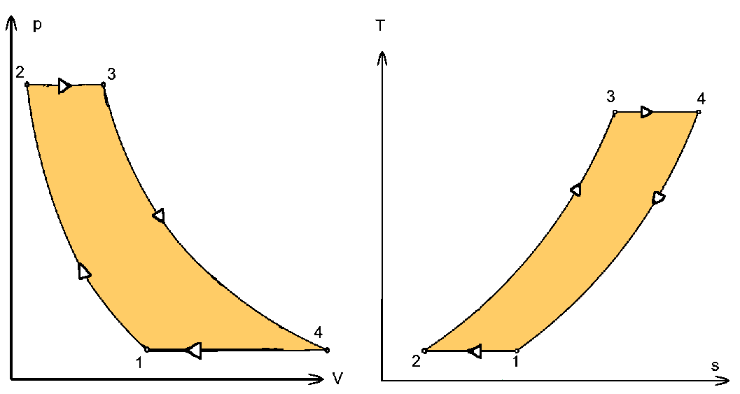 Description= p-v-Diagramm und T-s-Diagramm eines Ericsson-Motors